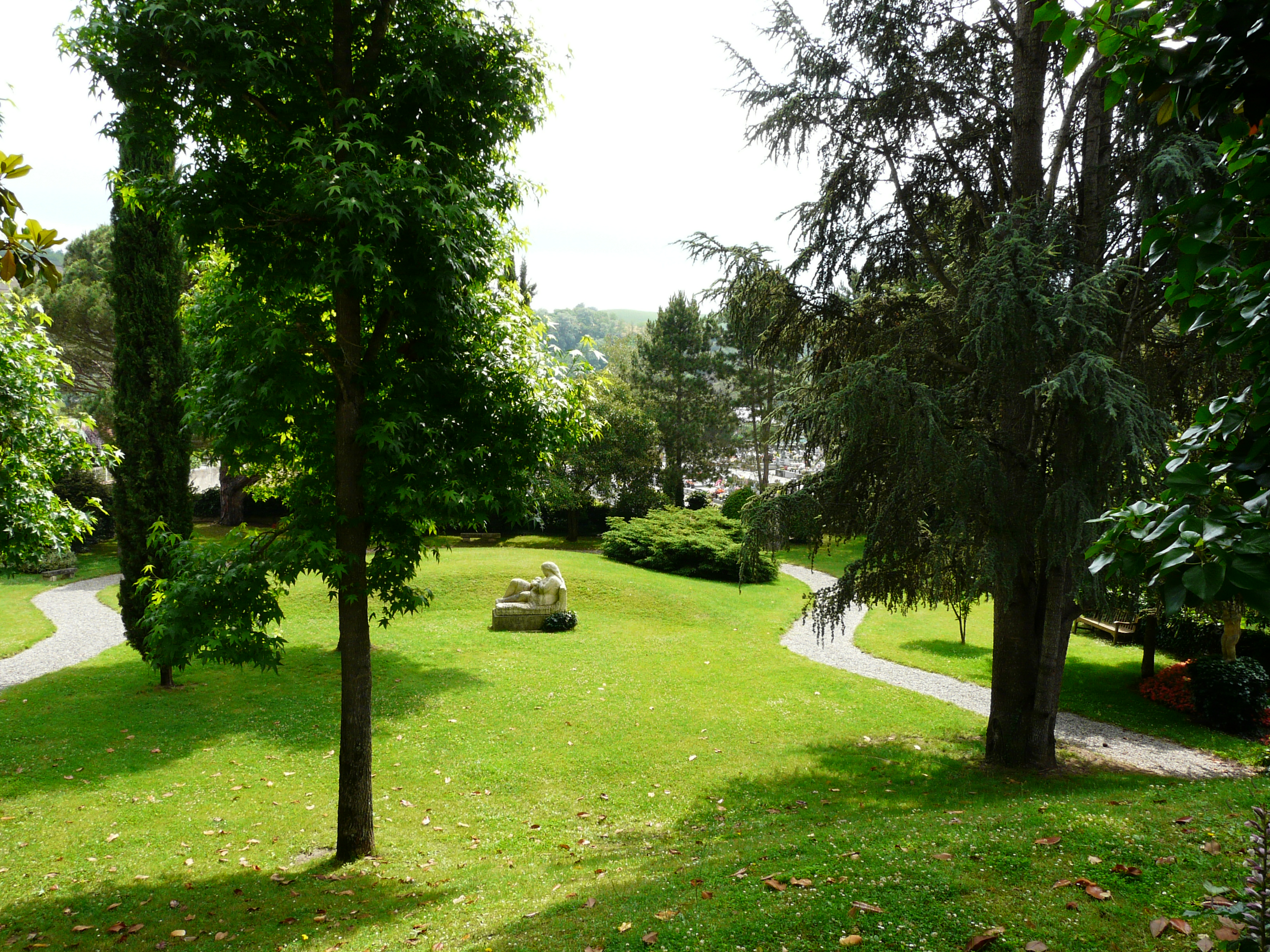 Le jardin du musée Abbal, Carbonne, Haute-Garonne, France.